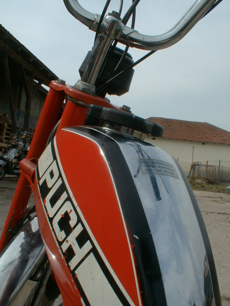 Nahaufnahe des Tanks einer 1976er Puch X30